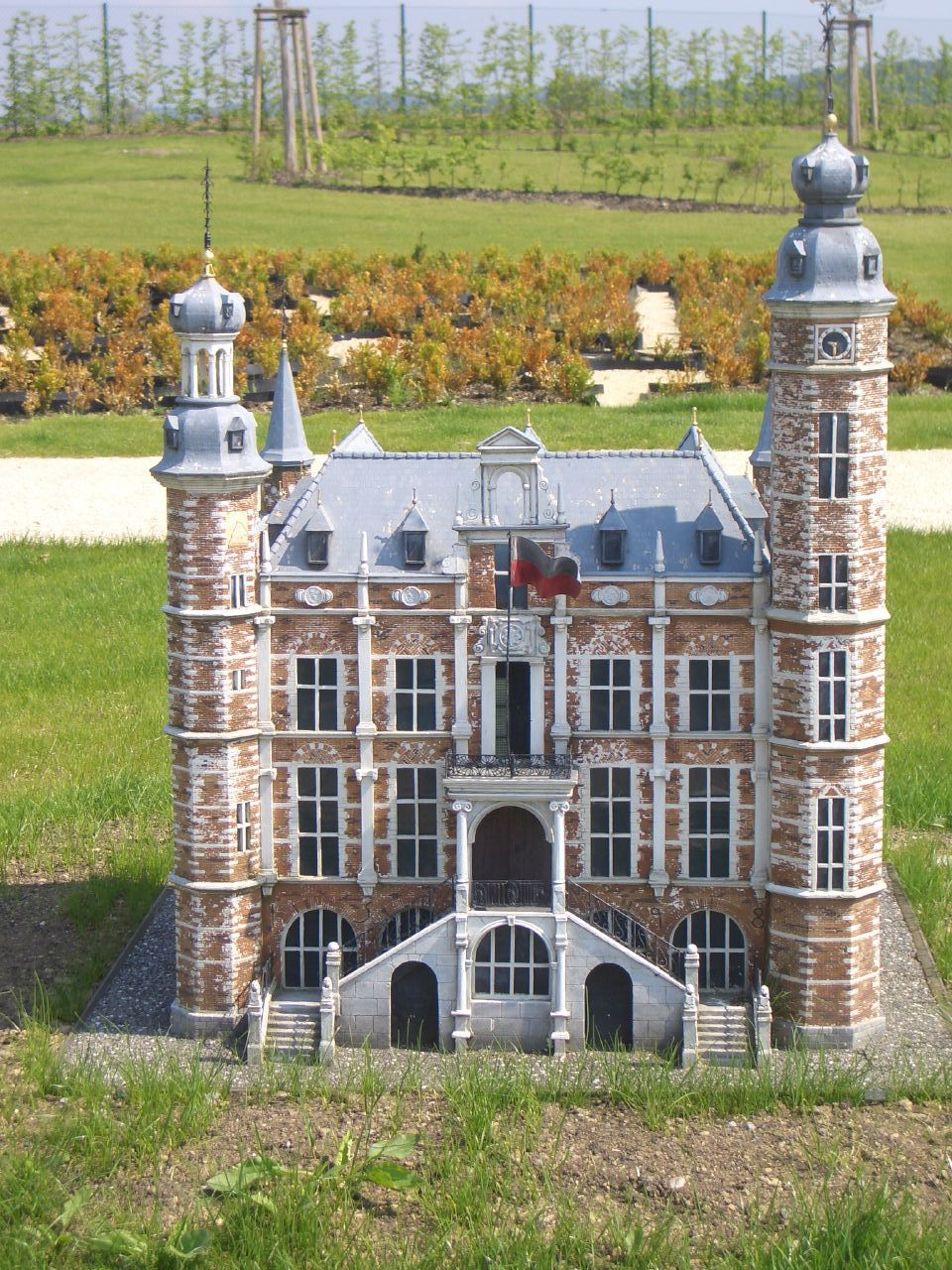 Model of Townhall Venlo at Minumundus Bodensee in Meckenbeuren-Liebenau, Germany